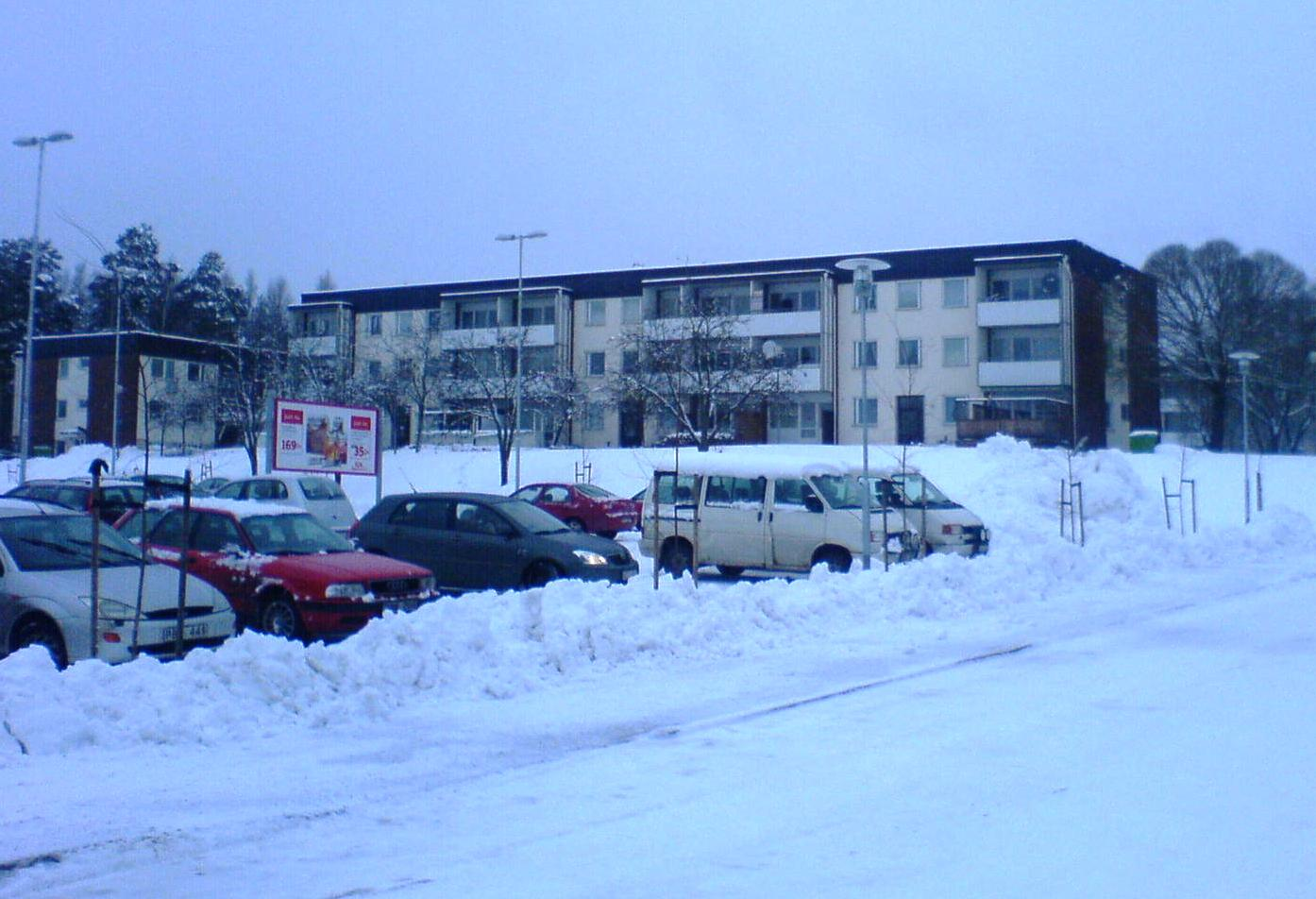 Hyreshus i Björksätra. Orginalfärger och fasad.